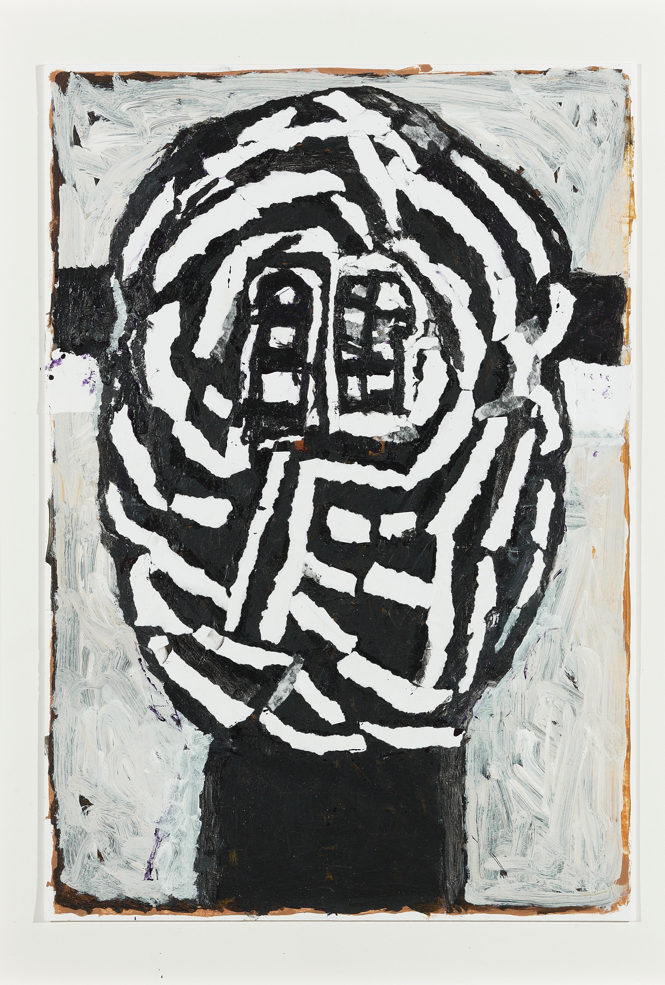 Oeuvre du peintre François Dilasser (1926-2012)